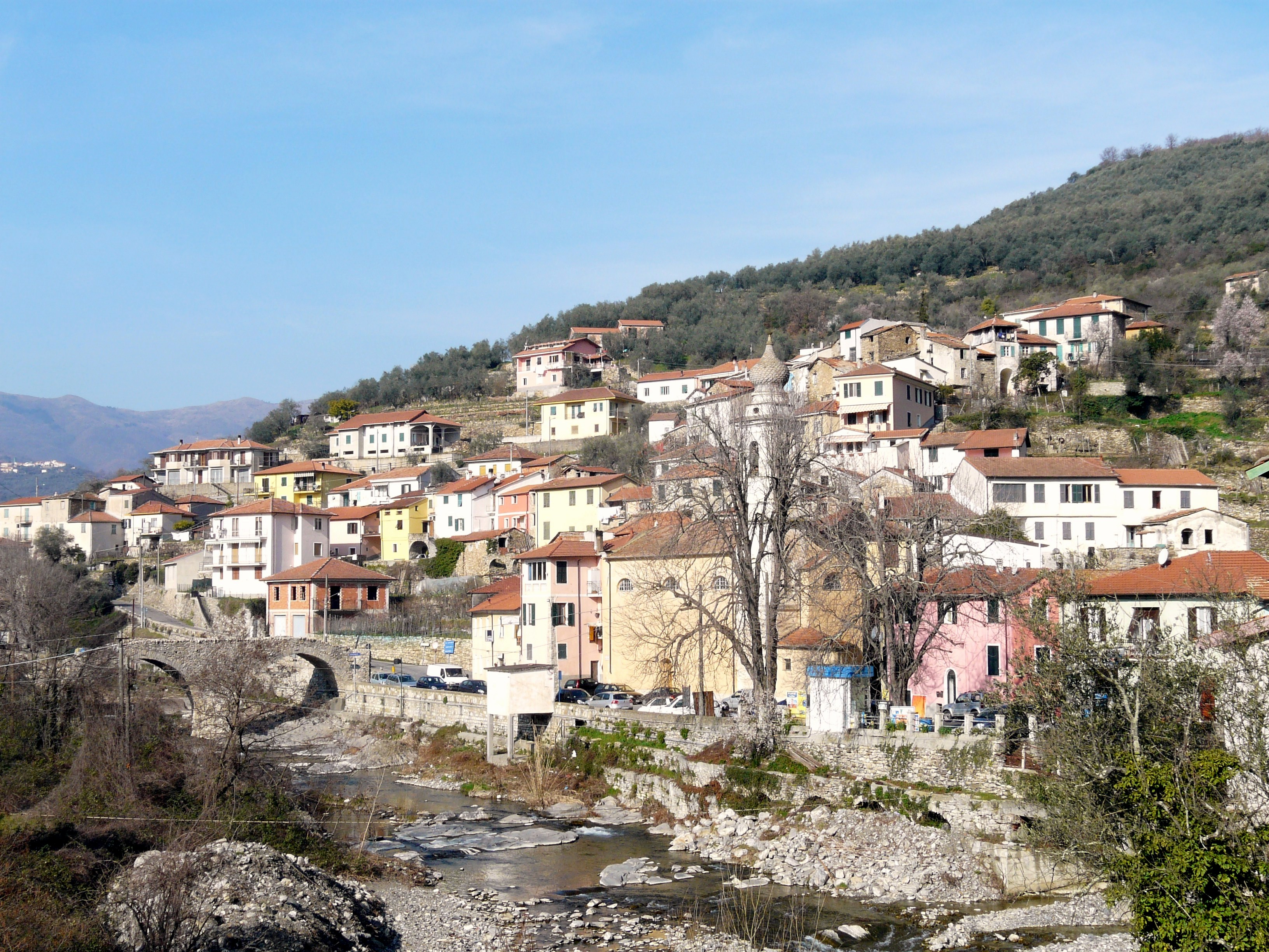 San Lazzaro Reale, Borgomaro, Liguria, Italia